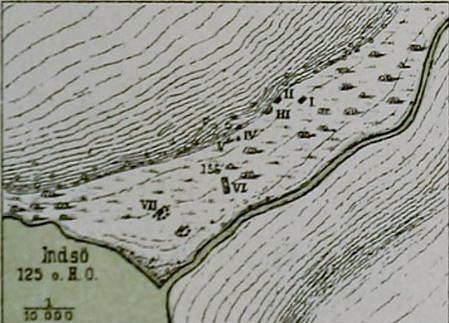 Vestiges Kagdlimiut Vatnahverfi.